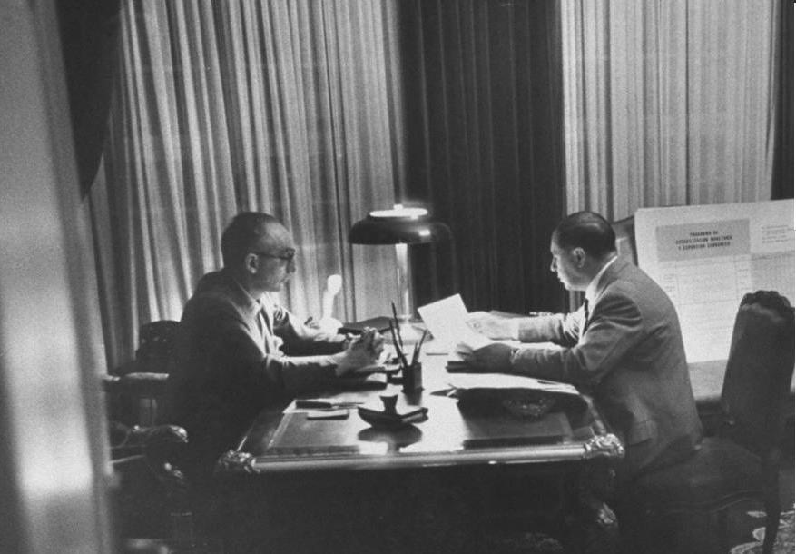 Es una foto del ministro de económia Alvaro Alsogaray (derecha), junto al presidente Arturo Frondizi, viendo la situación del país.